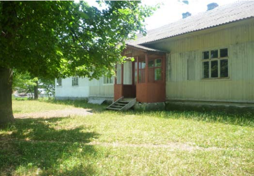 Місце, де колись знаходився монастир у с. Спас. О. Бегей, О. Анісімович-Шевчук ISSN 2078-6441. Вісник львівського університету. Серія географічна. 2013. Випуск 43. Ч. 1.